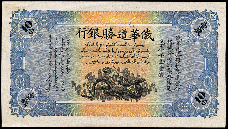 俄华道胜银行金币券1钱正面